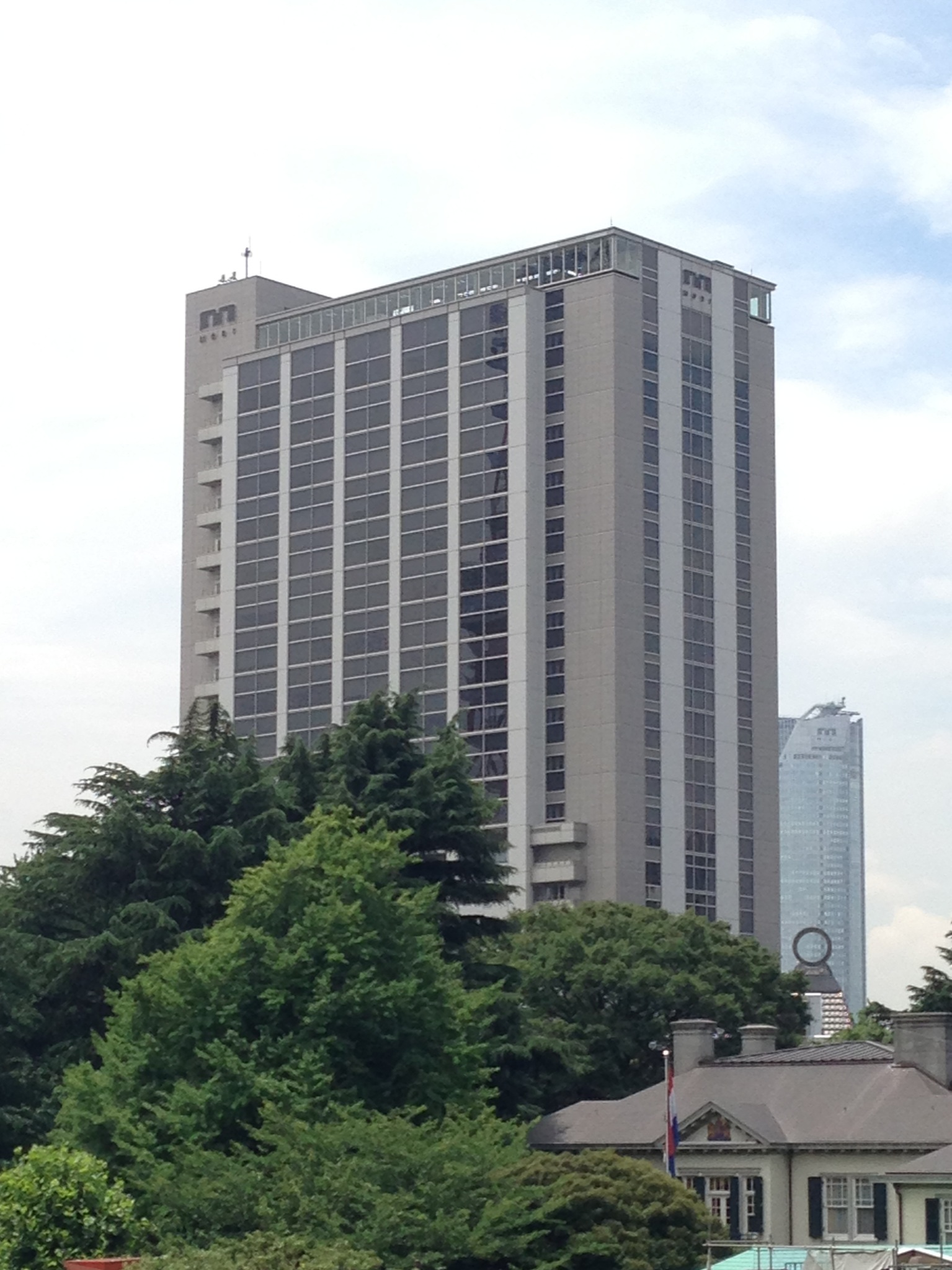 オランダヒルズ森タワー